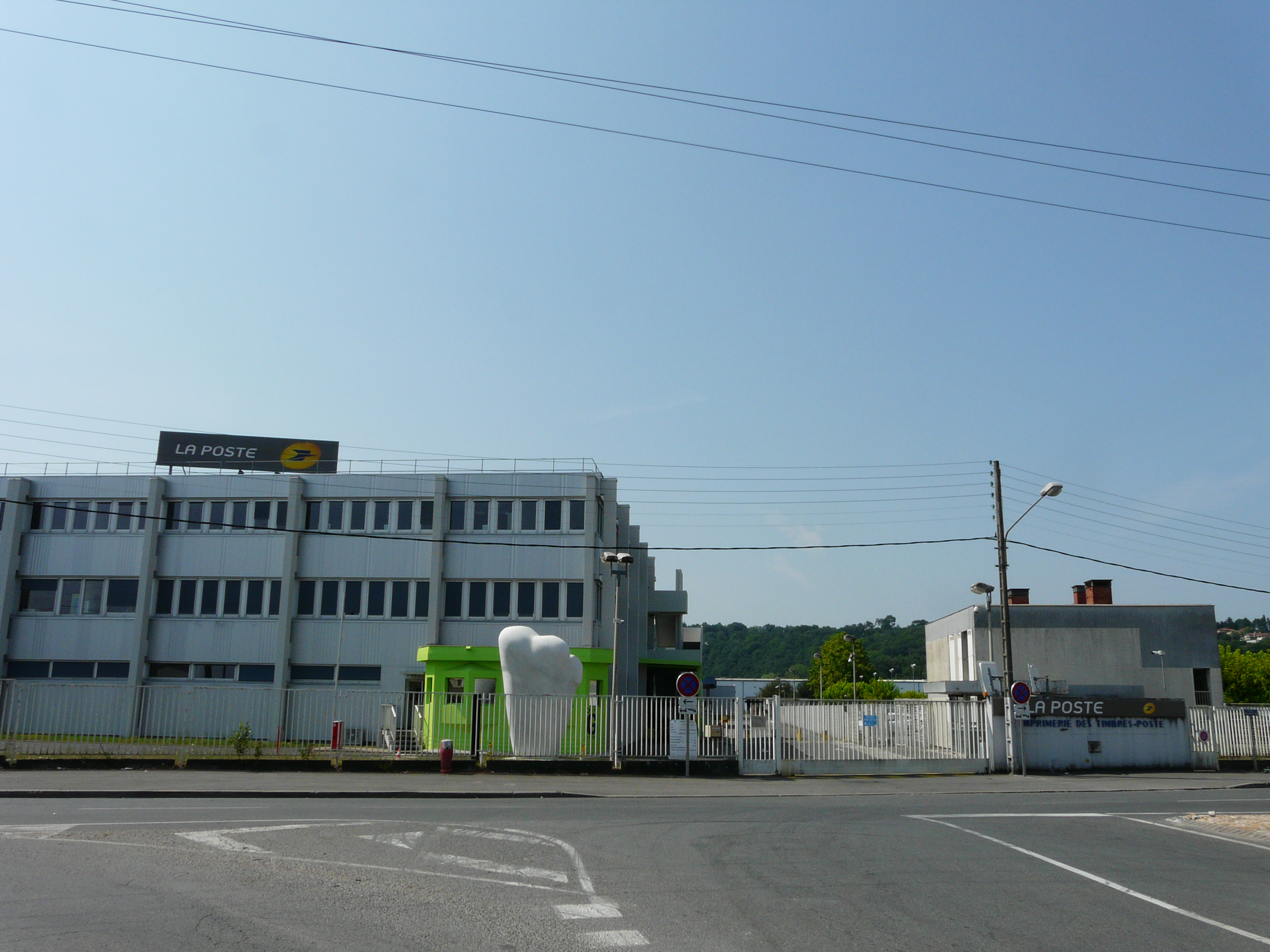 Les bâtiments de Phil@poste Boulazac, Dordogne, France.